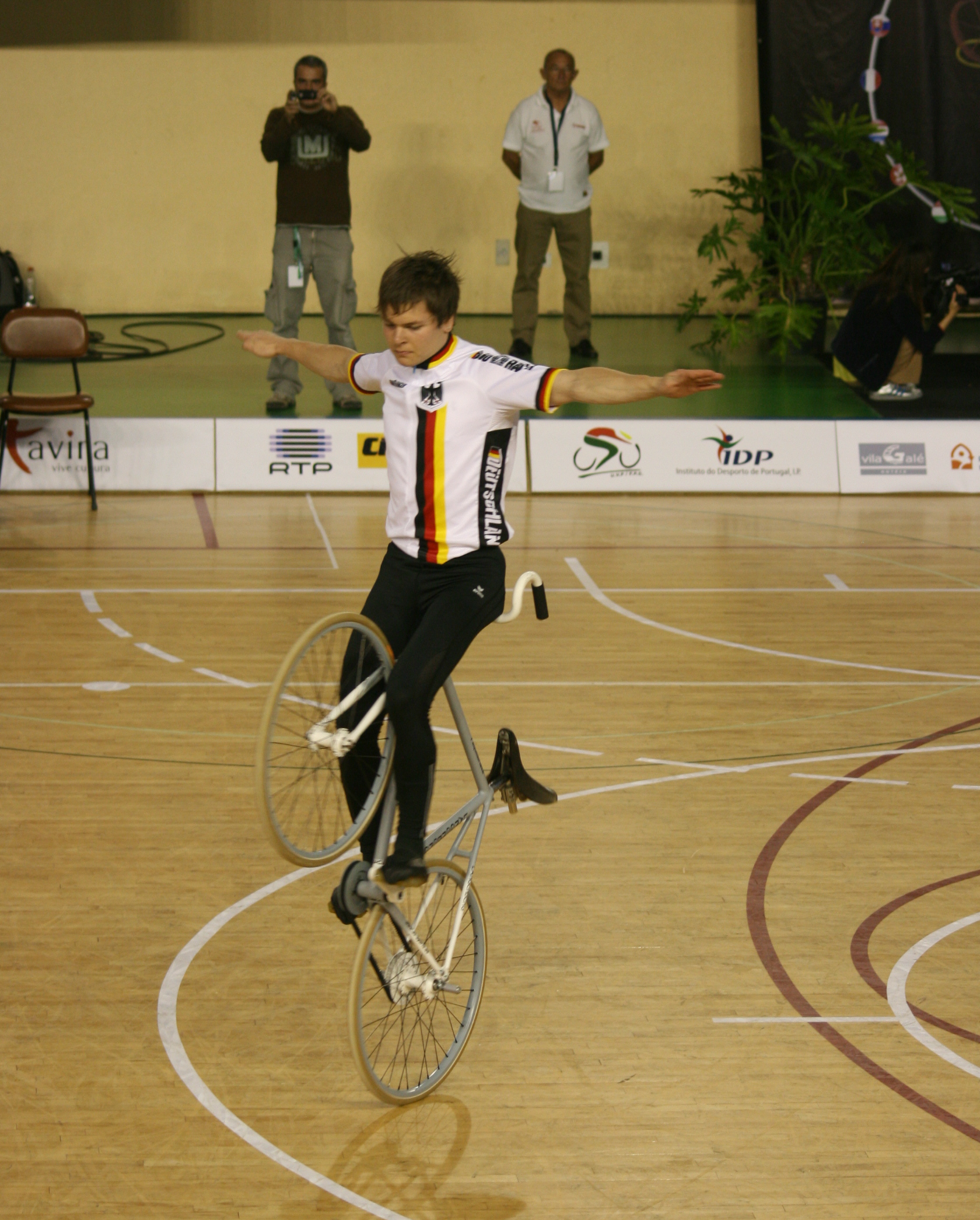 David Schnabel bei der Weltmeisterschaft 2009 in Tavira, Portugal